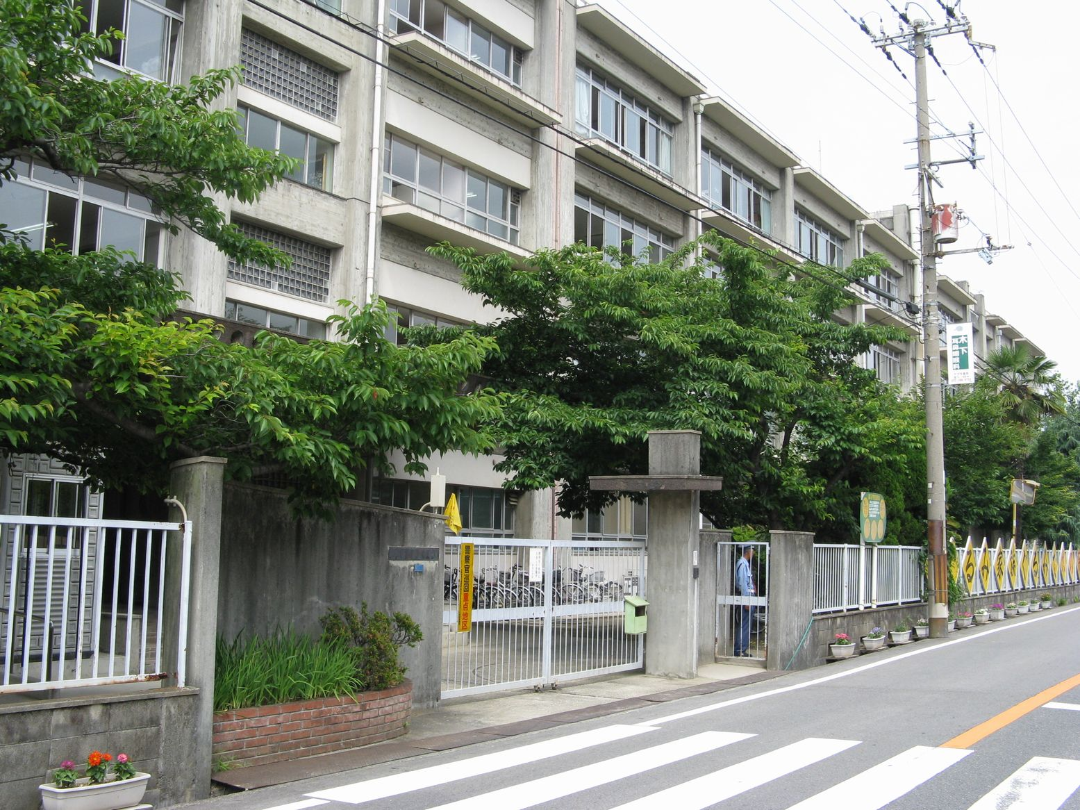 高石市立加茂小学校 2008年6月10日 Bakkai撮影